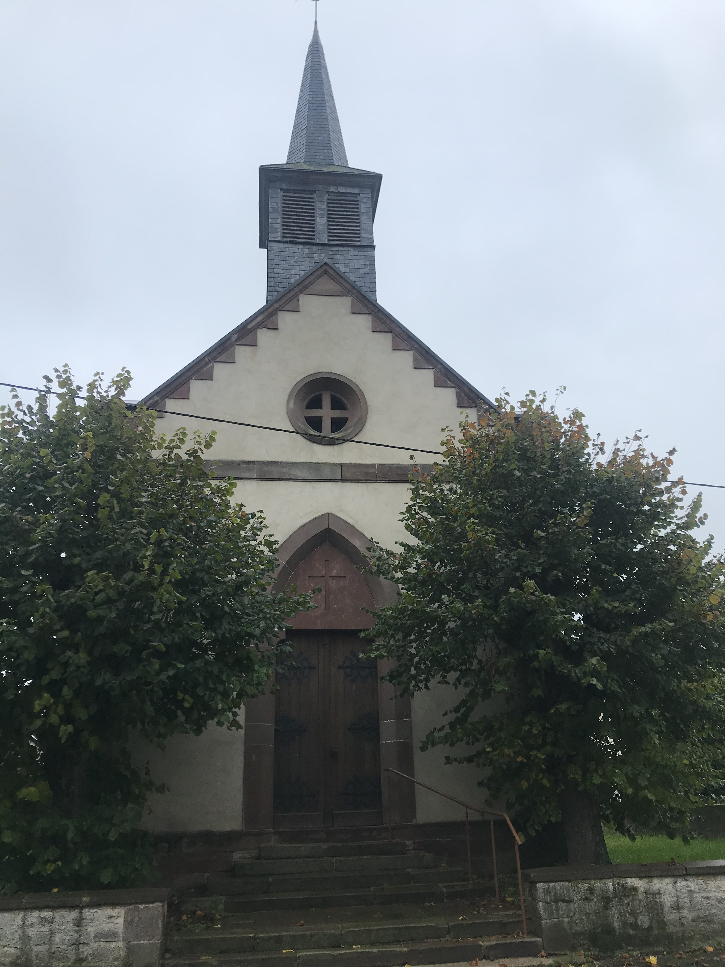 Sur cette photo, on peut observer l'église catholique de Schoppert